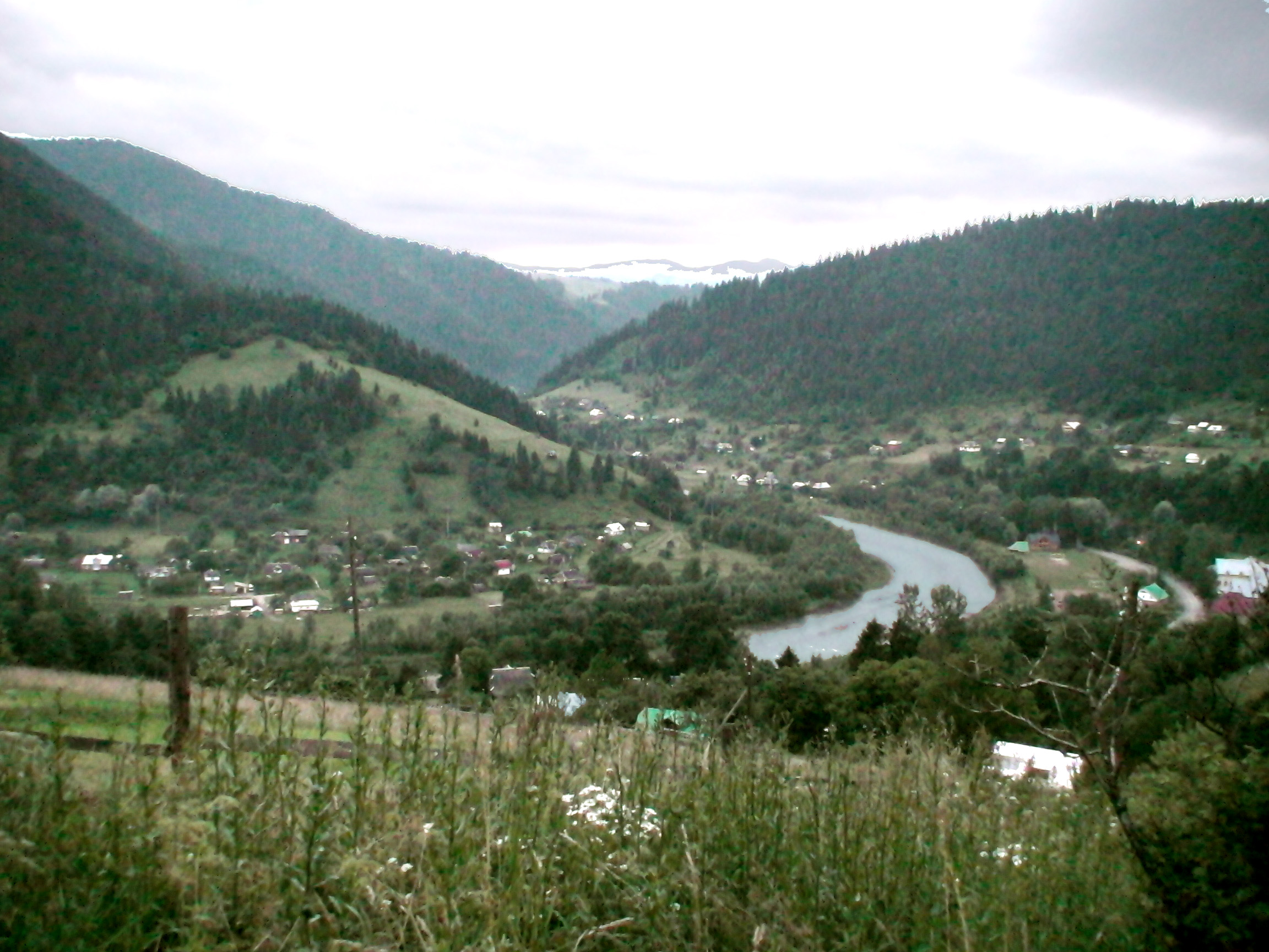 Вид на центральную часть села Криворивня и реку Чёрный Черемош